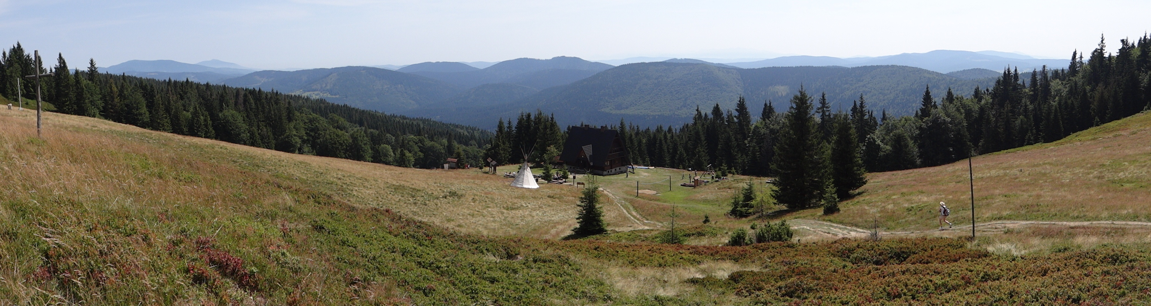 Panorama widokowa z okolic Przełęczy Halnej